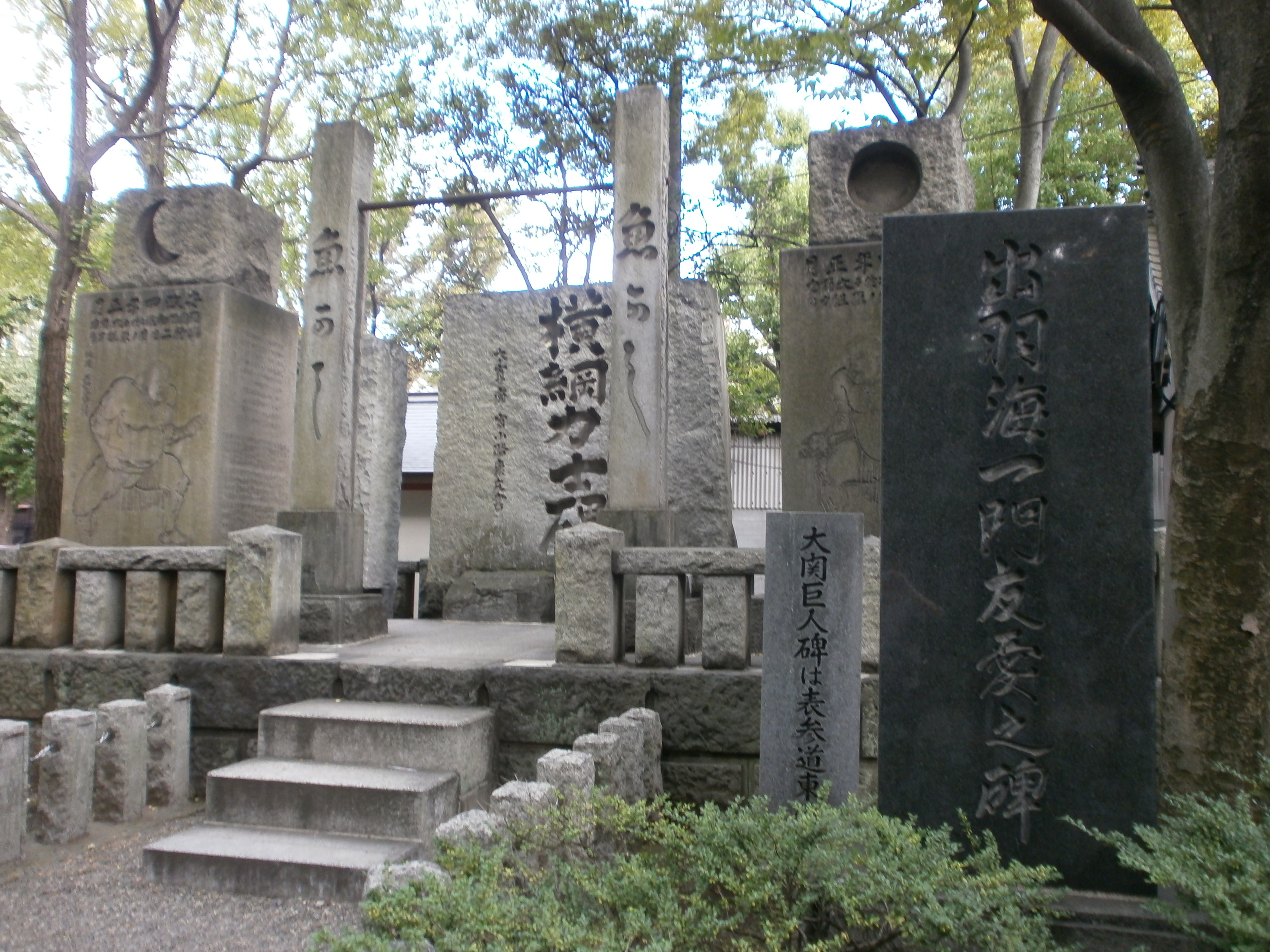 角界保守本流を象徴する出羽海一門友愛碑